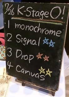 amiinaセトリボード(20150726(2))